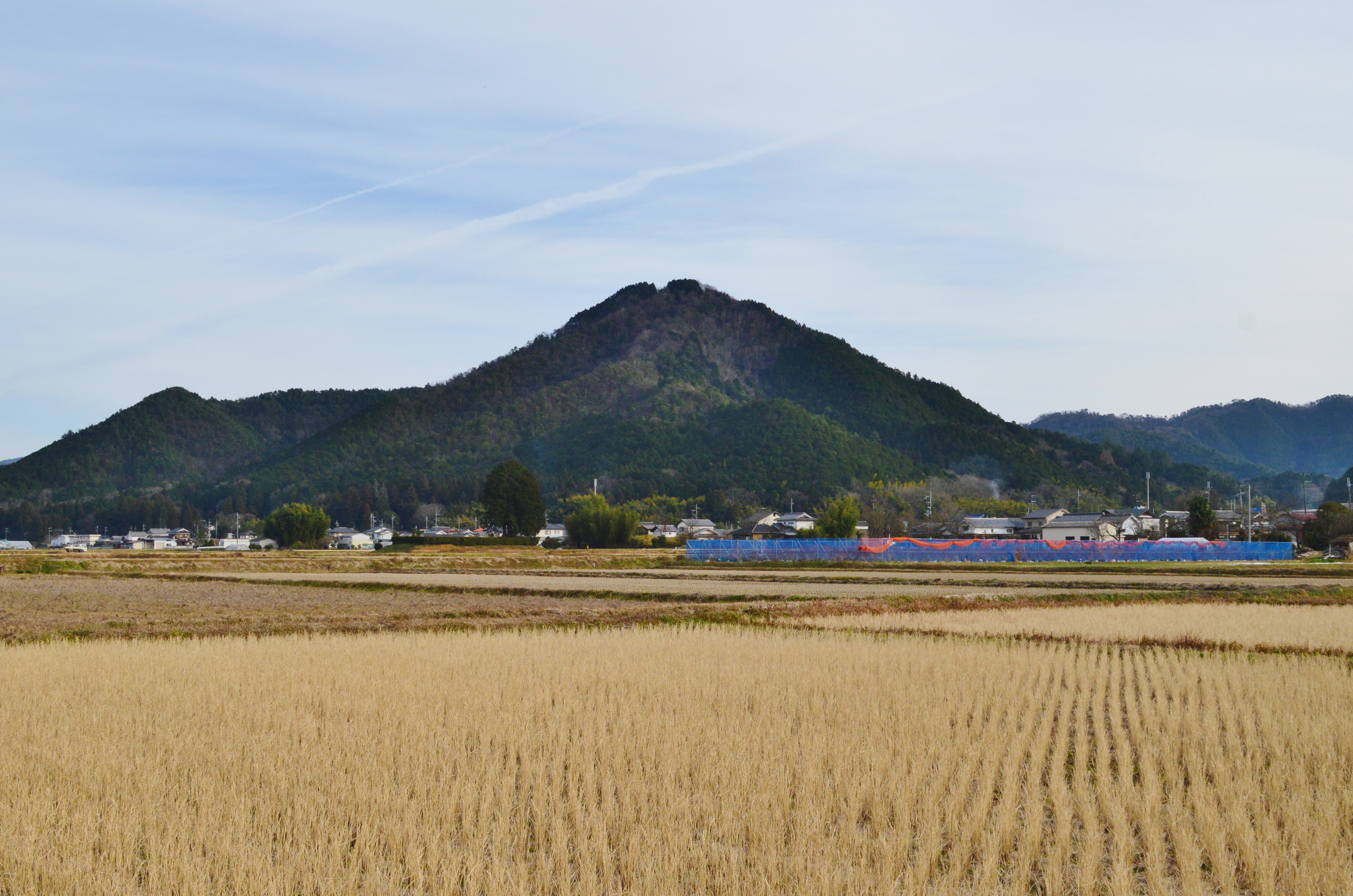 高城山 (丹波富士) 全景